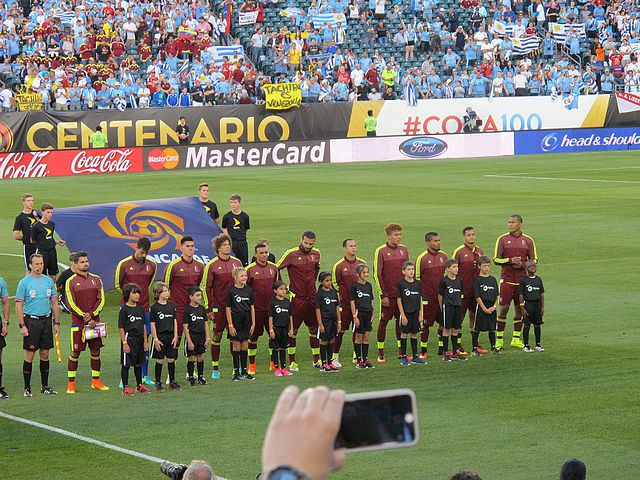 Jugadores de la selección de fútbol de Venezuela se alinean antes del comienzo del VEN-URU en la Copa América Centenario.